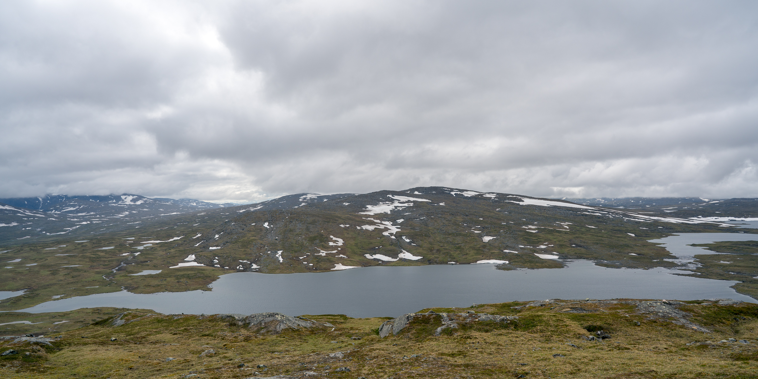 Lulep Rissájávrre - vy från Nuortap Rissávárre.